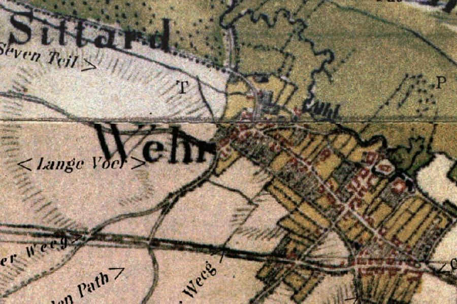 Kartenaufnahme der Rheinlande 1804/05